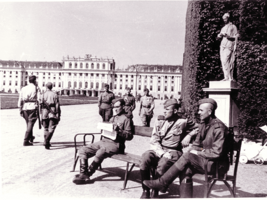 Мирные будни в послевоенной Вене